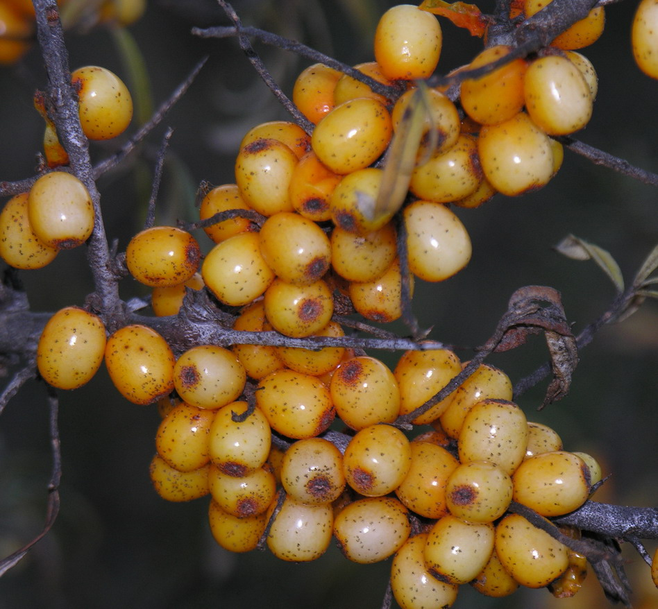 Dygliuotojo šaltalankio (Hippophae rhamnoides) vaisiai Foto: Algirdas, 2005 m. lapkričio 1 d.